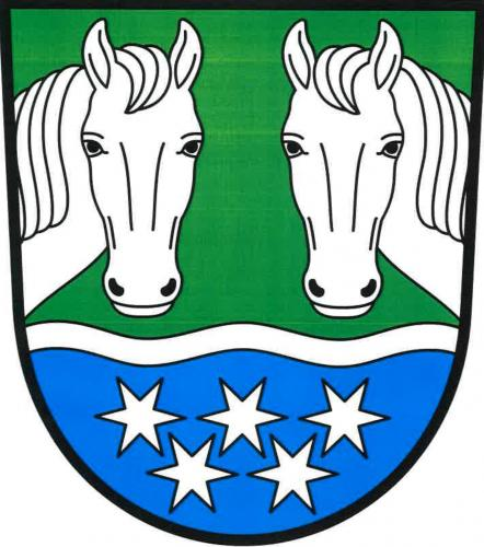 Stáj, okres Jihlava, znak